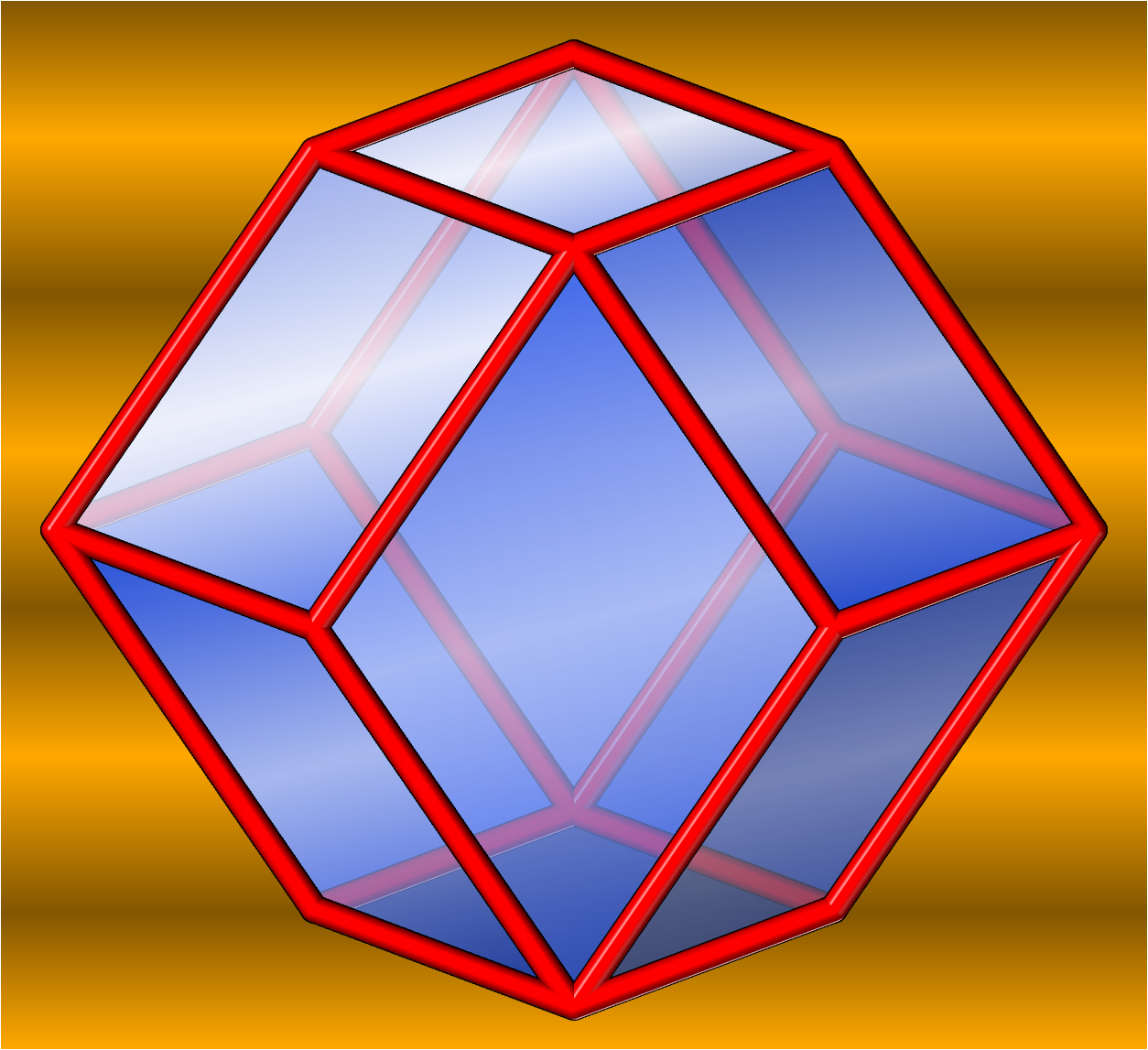 Dodecaedro rombico del 1° tipo in assonometria